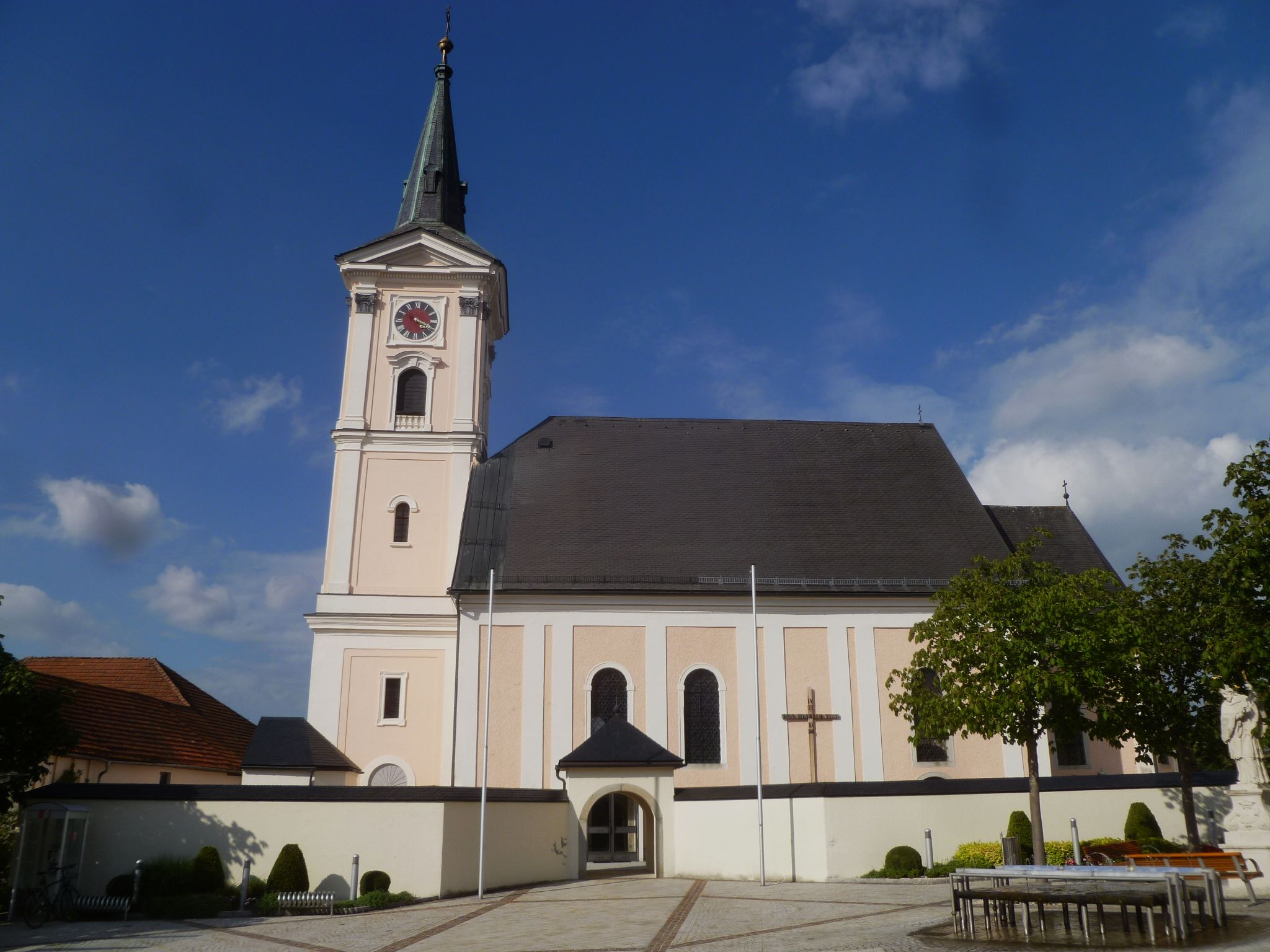 Kath. Pfarrkirche Mariä Himmelfahrt und Friedhof